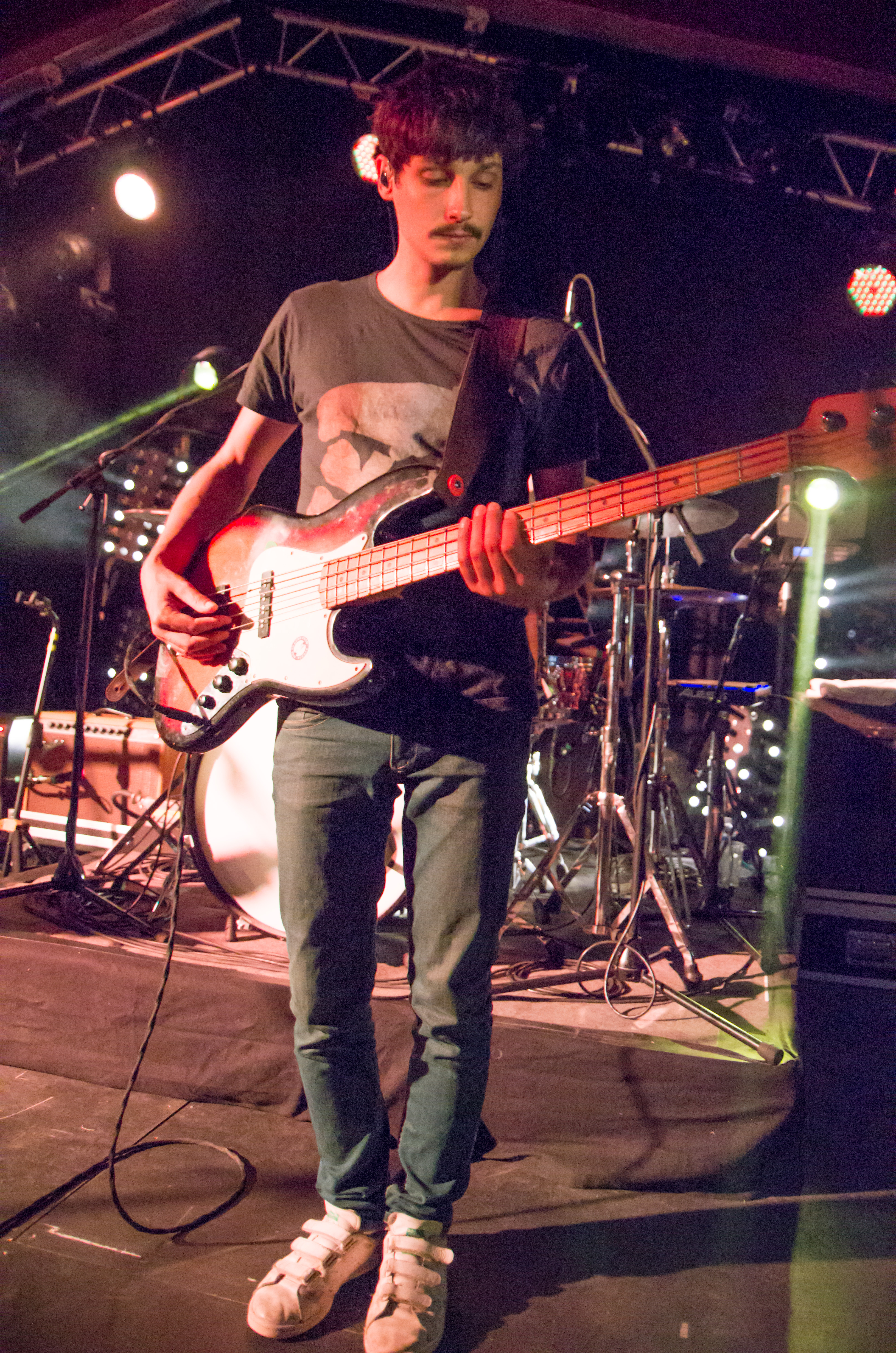 Das Zelt-Musik-Festival 2016 in Freiburg im Breisgau 21.07.2016 Philipp Dittberner & Band